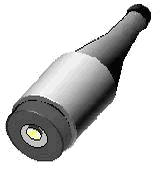 Umetak osigurača